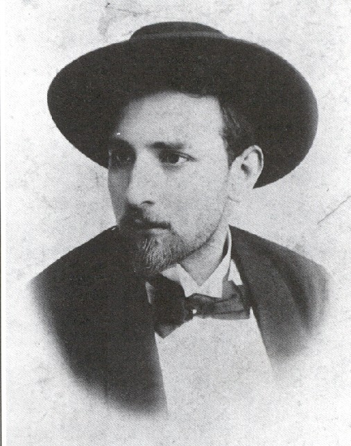 Pirandello biondo con i capelli a Roma dove comincia a frequentare l’ambiente letterario che gravitava intorno a Luigi Capuana e vive un periodo ricco di esperienze e di amicizie.